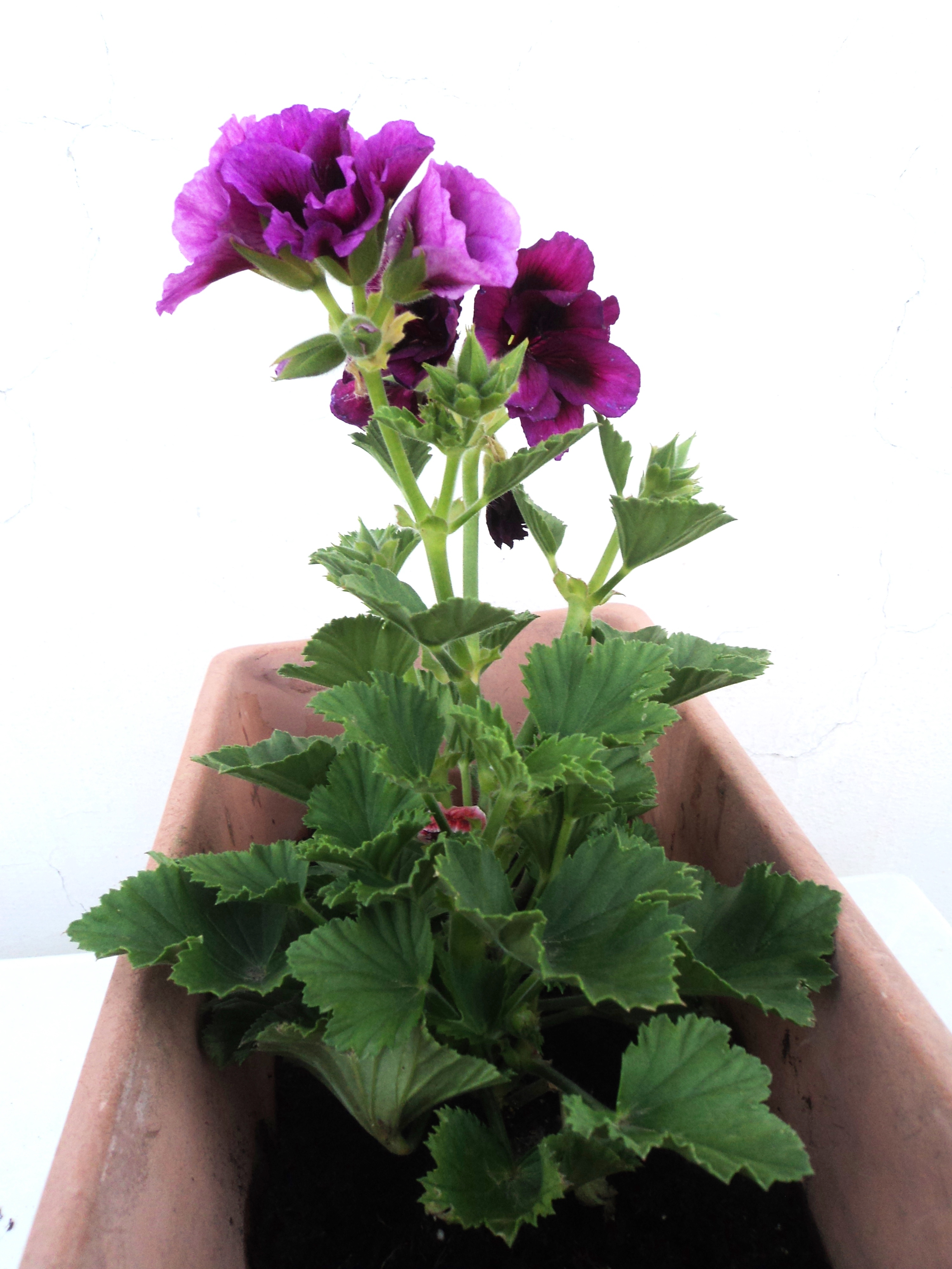 Geranio.